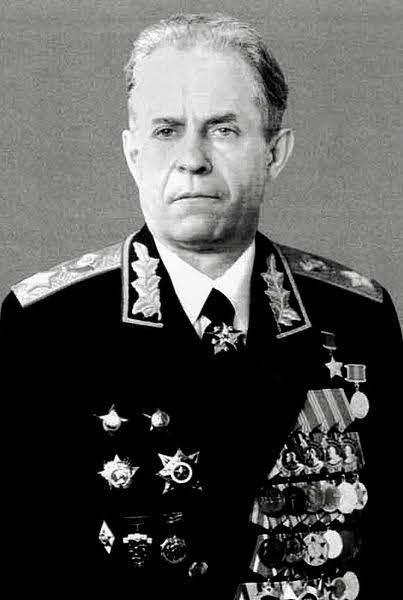 Начальник Генерального штаба Вооруженных Сил СССР (сентябрь 1984 — декабрь 1988) Ахромеев Сергей Федорович